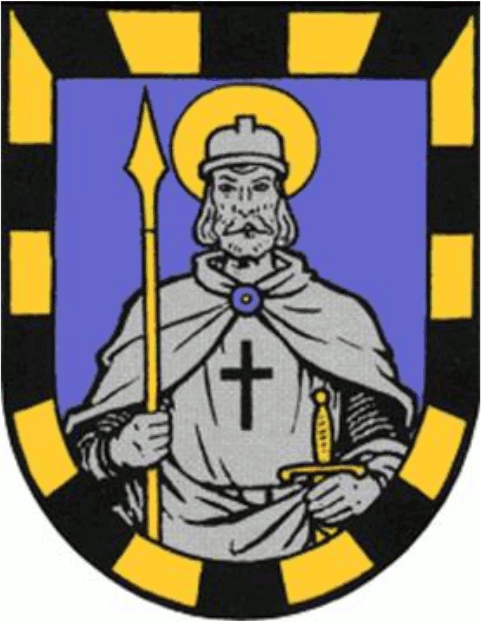 Coat of arms Oerel, Wappen der Gemeinde Oerel